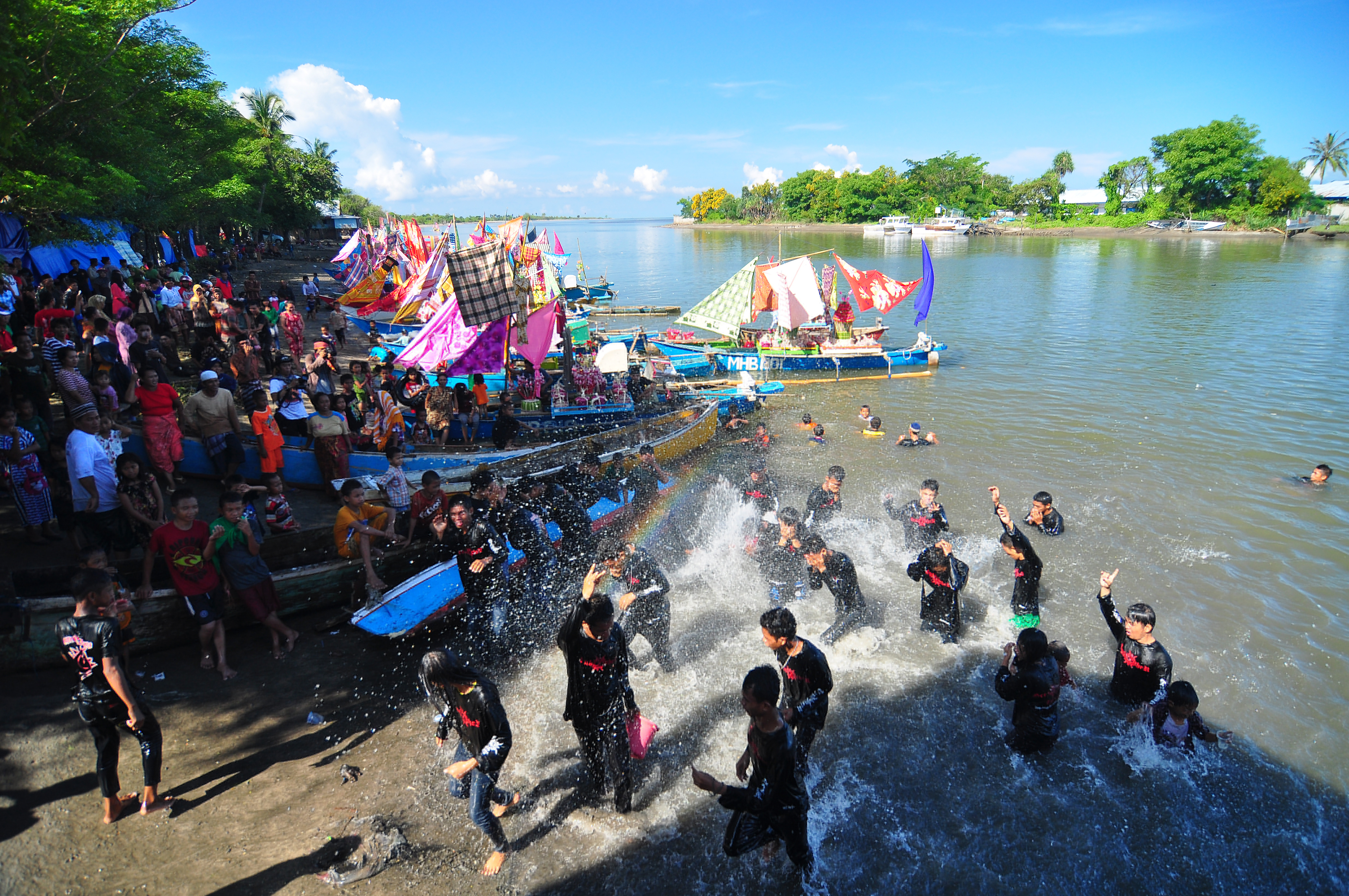 Acara maudu lompoa berakhir di sungai Cikoang dengan mandi bersama